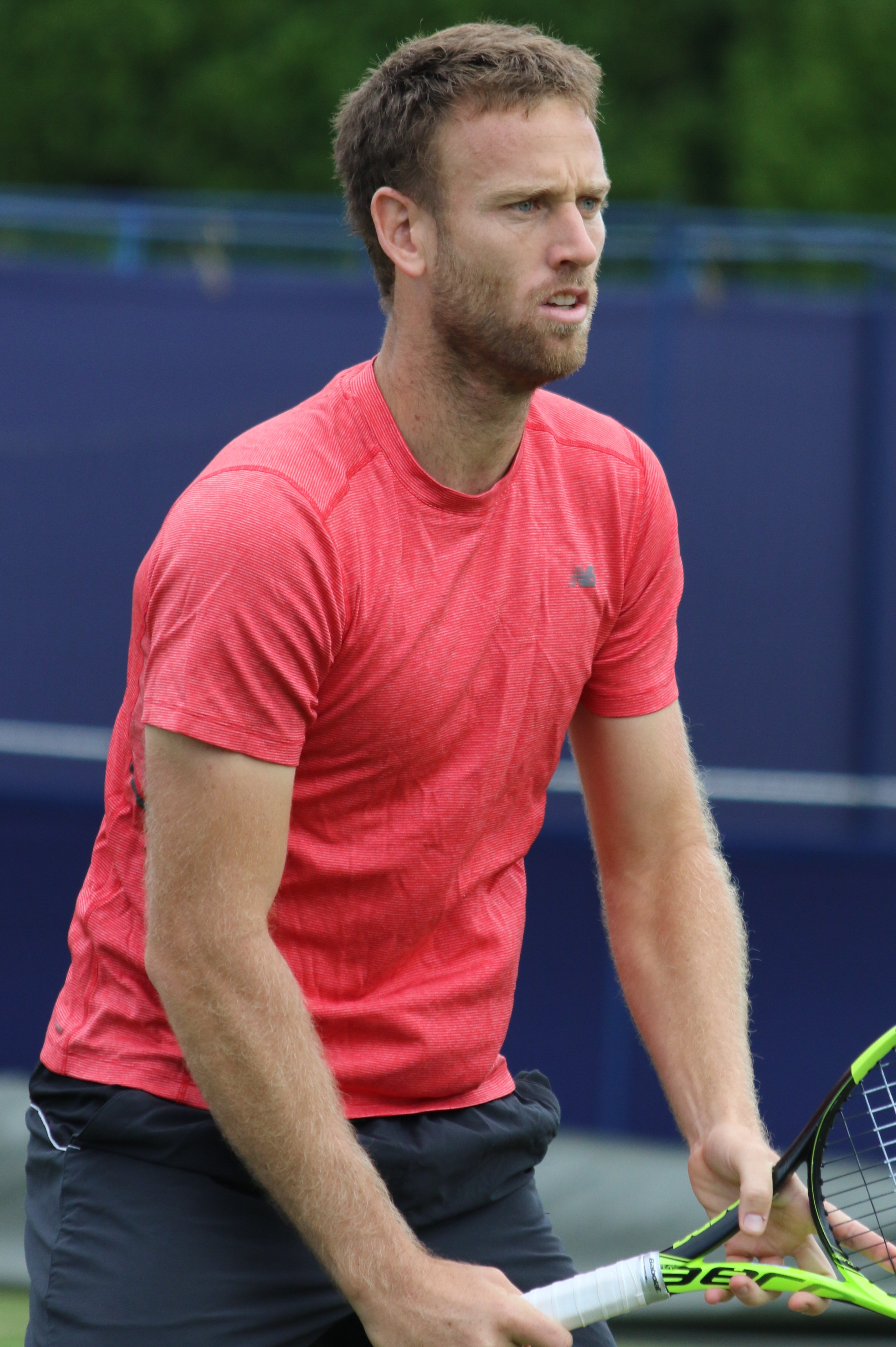 Venus EBN17 (8)